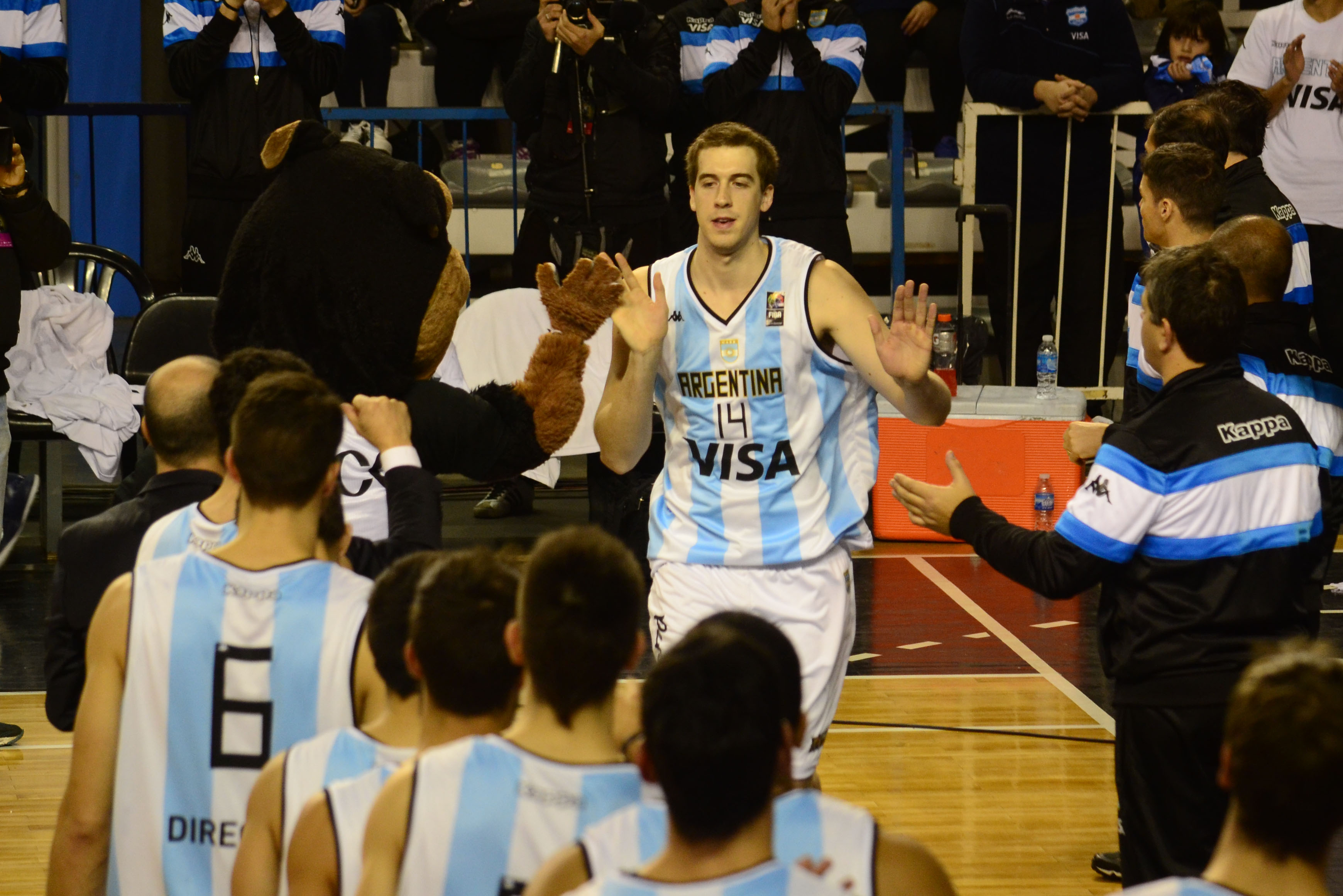 Matías Bortolín